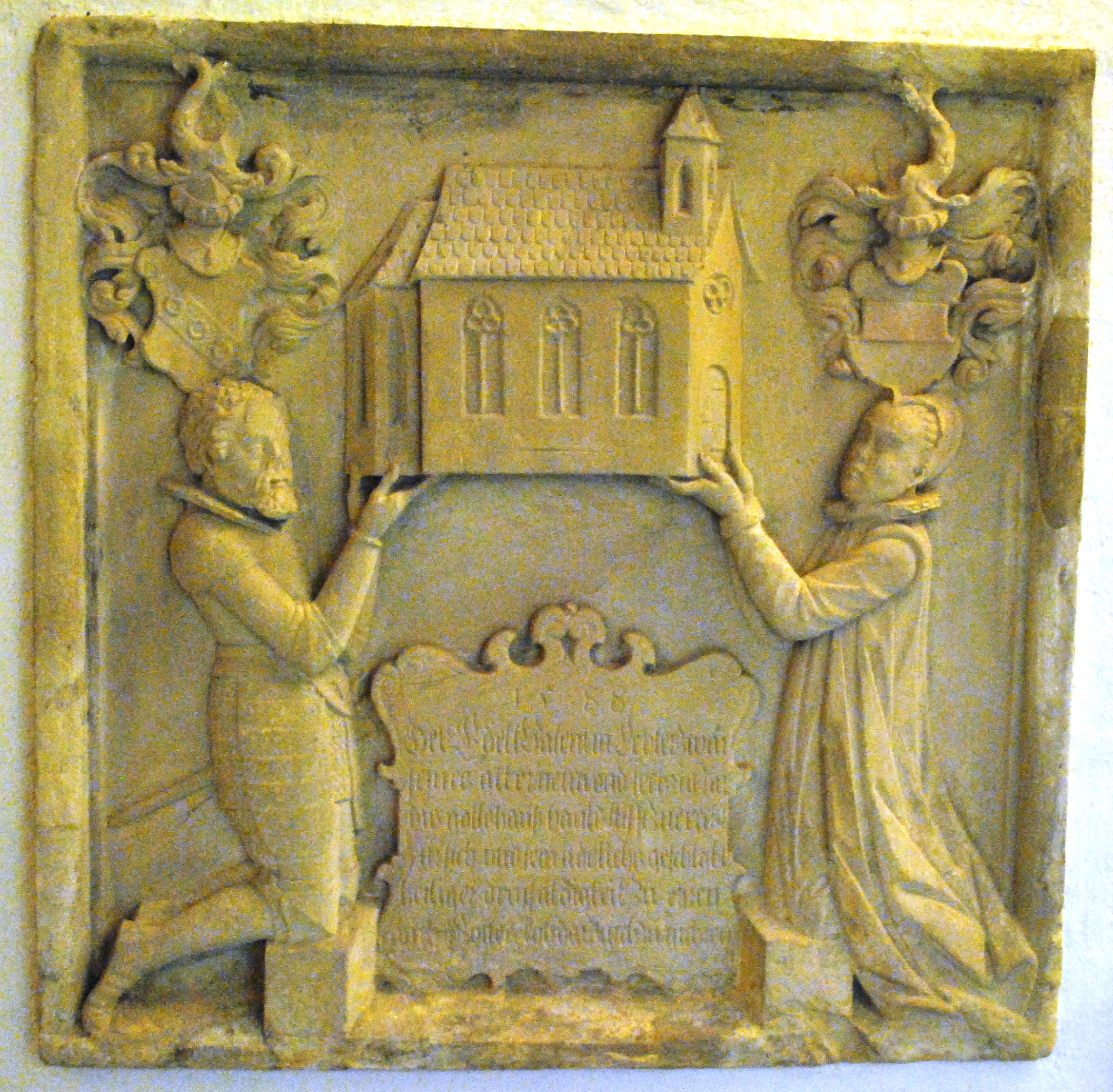 Würzburg, Mainfränkisches Museum, Votivstein Valentin Echter von Mespelbrunn von der alten Pfarrkirche in Gaibach, Fränkischer Meister, 1588